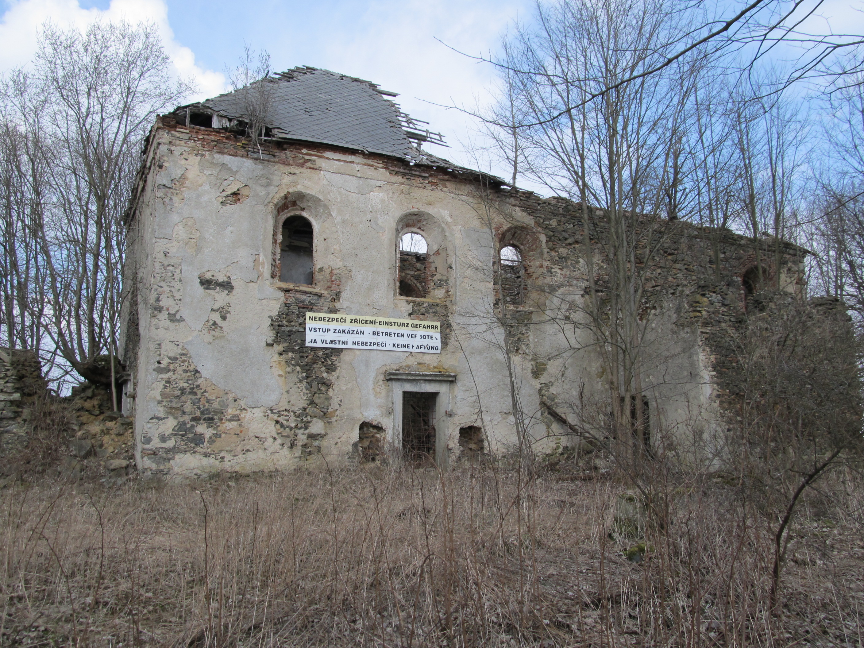 Bývalý poutní kostel svaté Anny nad Pořejovem